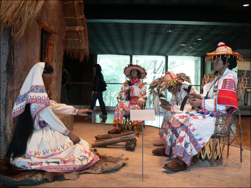 Manequins